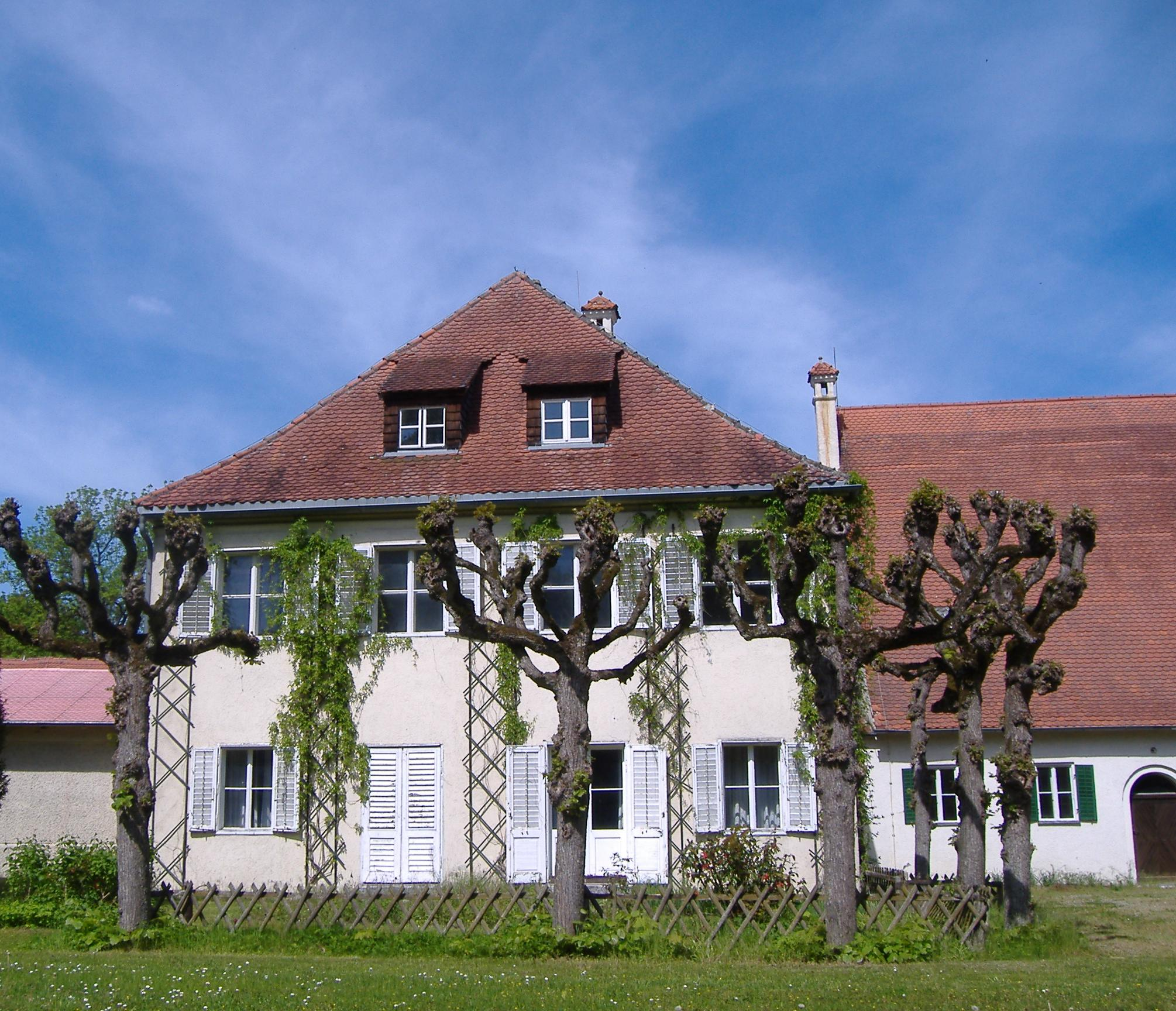 Innenhof Gut Rohrenfels